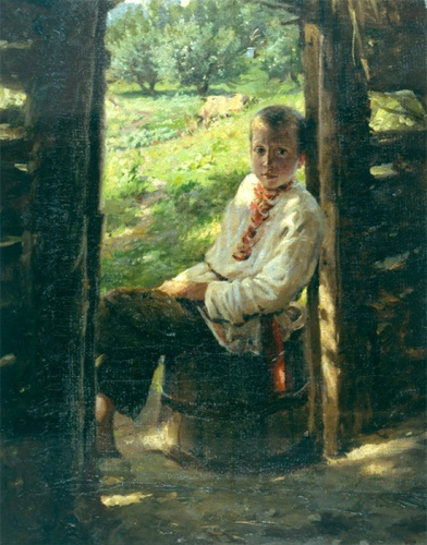 Портрет мальчика-украинца